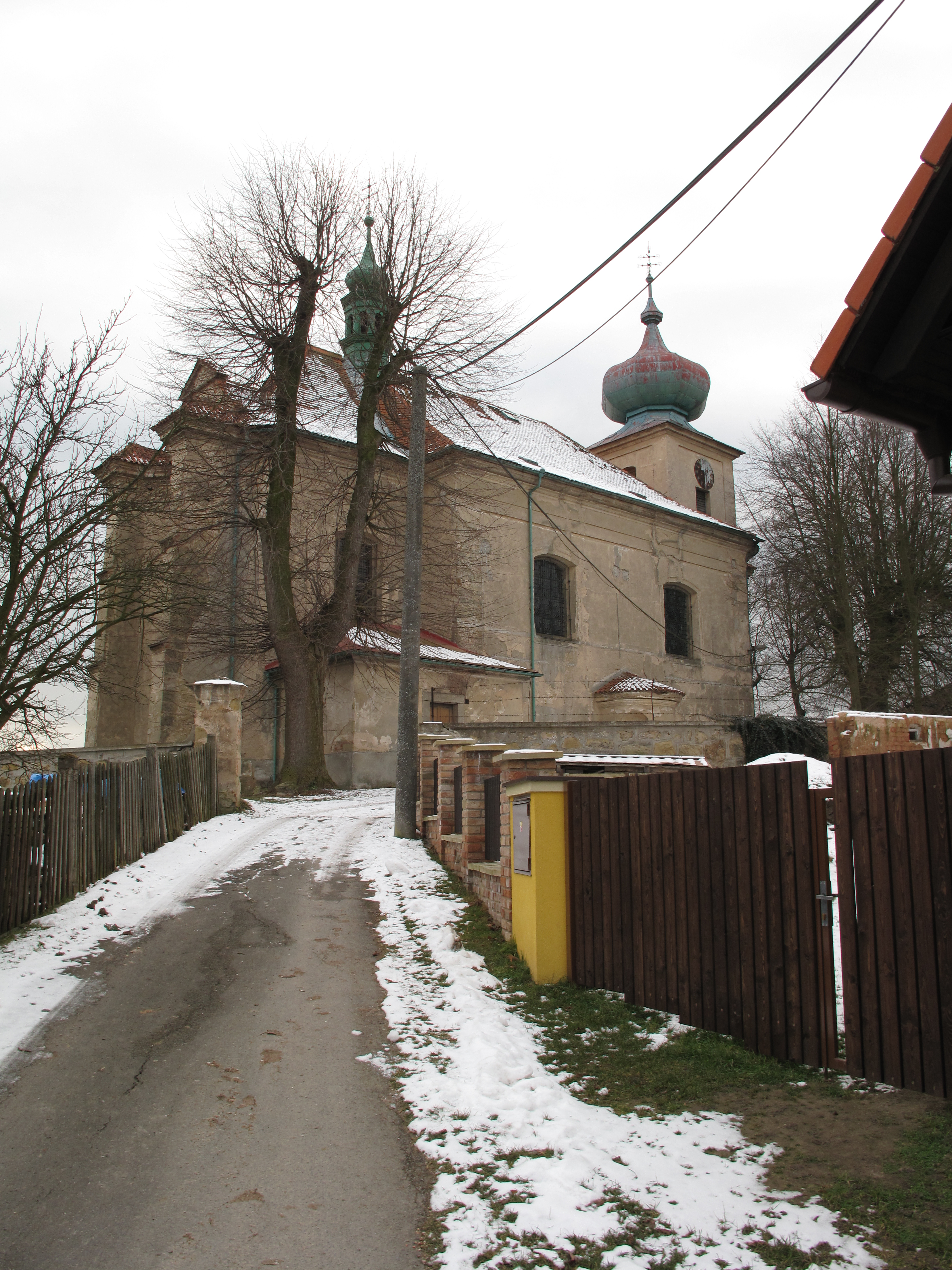 Kostel v Žerčicích. Okres Mladá Boleslav, Česká republika.